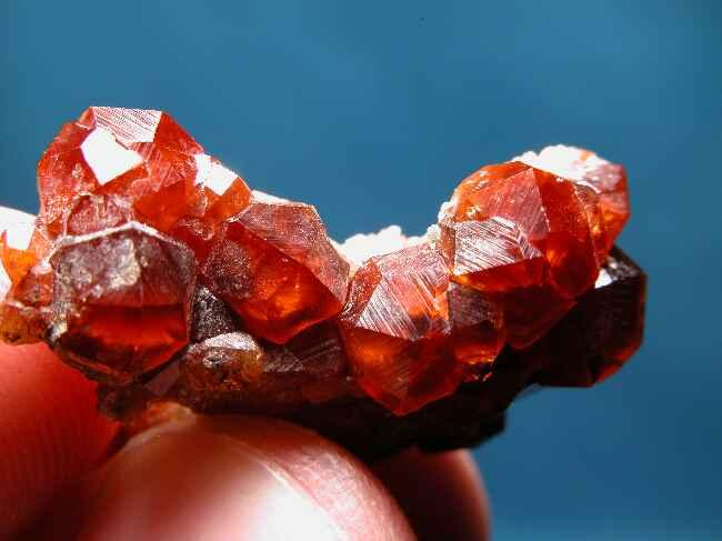 granat, pochodzenie Chiny; autor zdjęcia Piotr Menducki